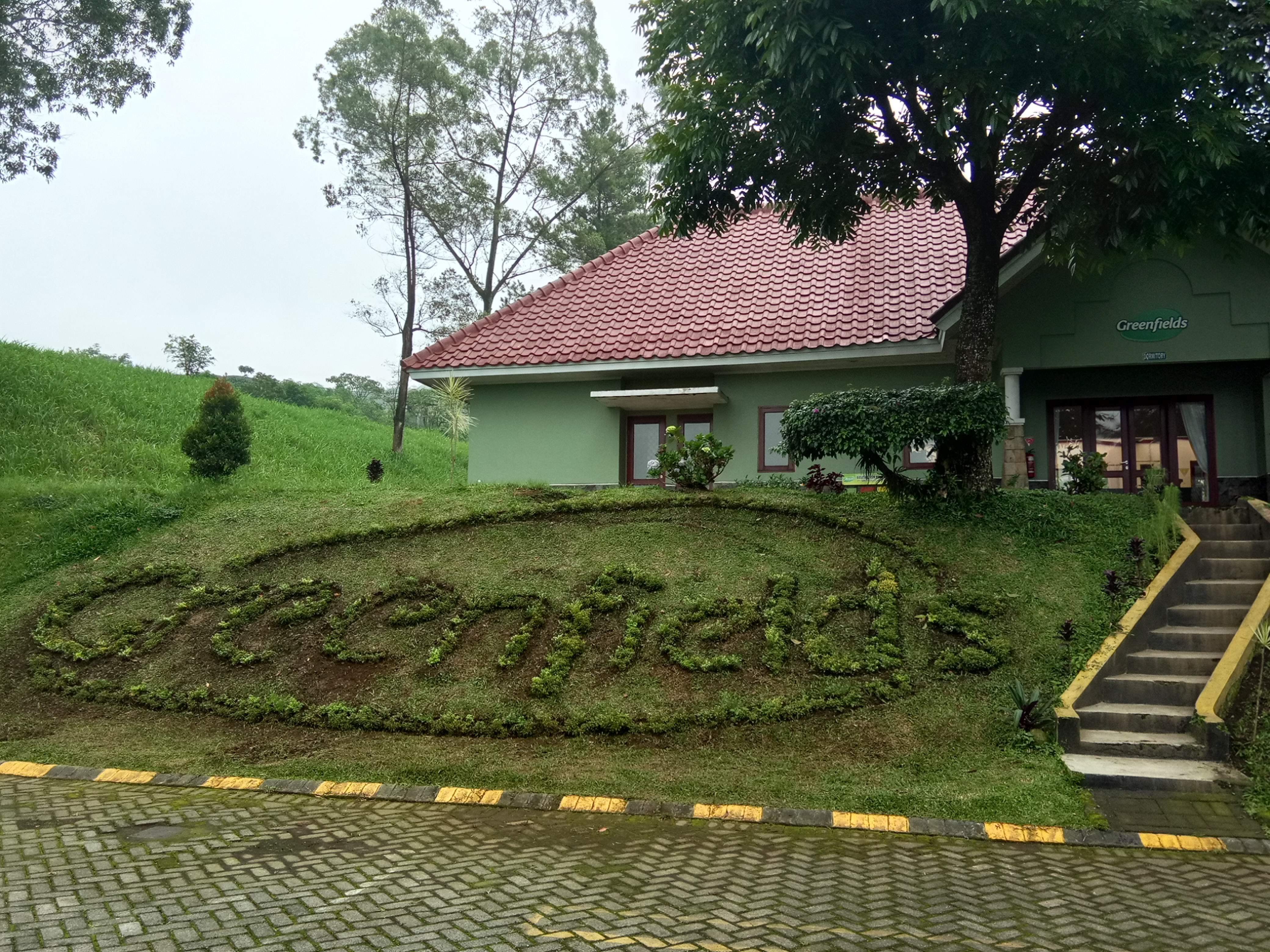 Kantor Pusat Greenfields Dairy